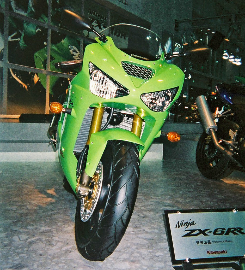 Kawasaki ZX-6RR(2003 Tokyo Motor Show)